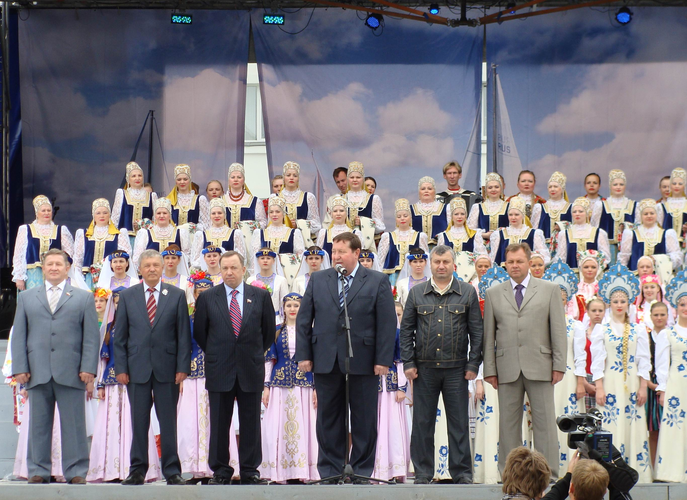 Справа налево: Павленко, Виктор Николаевич (мэр Архангельска) Кокойты, Эдуард Джабеевич (Президент Южной Осетии Михальчук, Илья Филиппович (губернатор Архангеьской области) Львов Николай Питиримович (генеральный директор Соломбальского ЦБК) Виталий Сергеевич Фортыгин (Председатель Архангельского областного Собрания депутатов) Анатолий Евгеньевич Кожин (председатель горсовета)